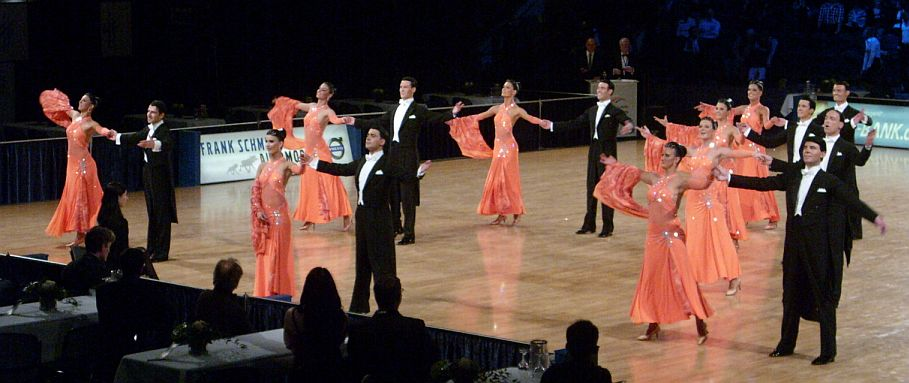 Standardformation des TC „Der Frankfurter Kreis“ bei der Deutschen Meisterschaft der Formationen 2009